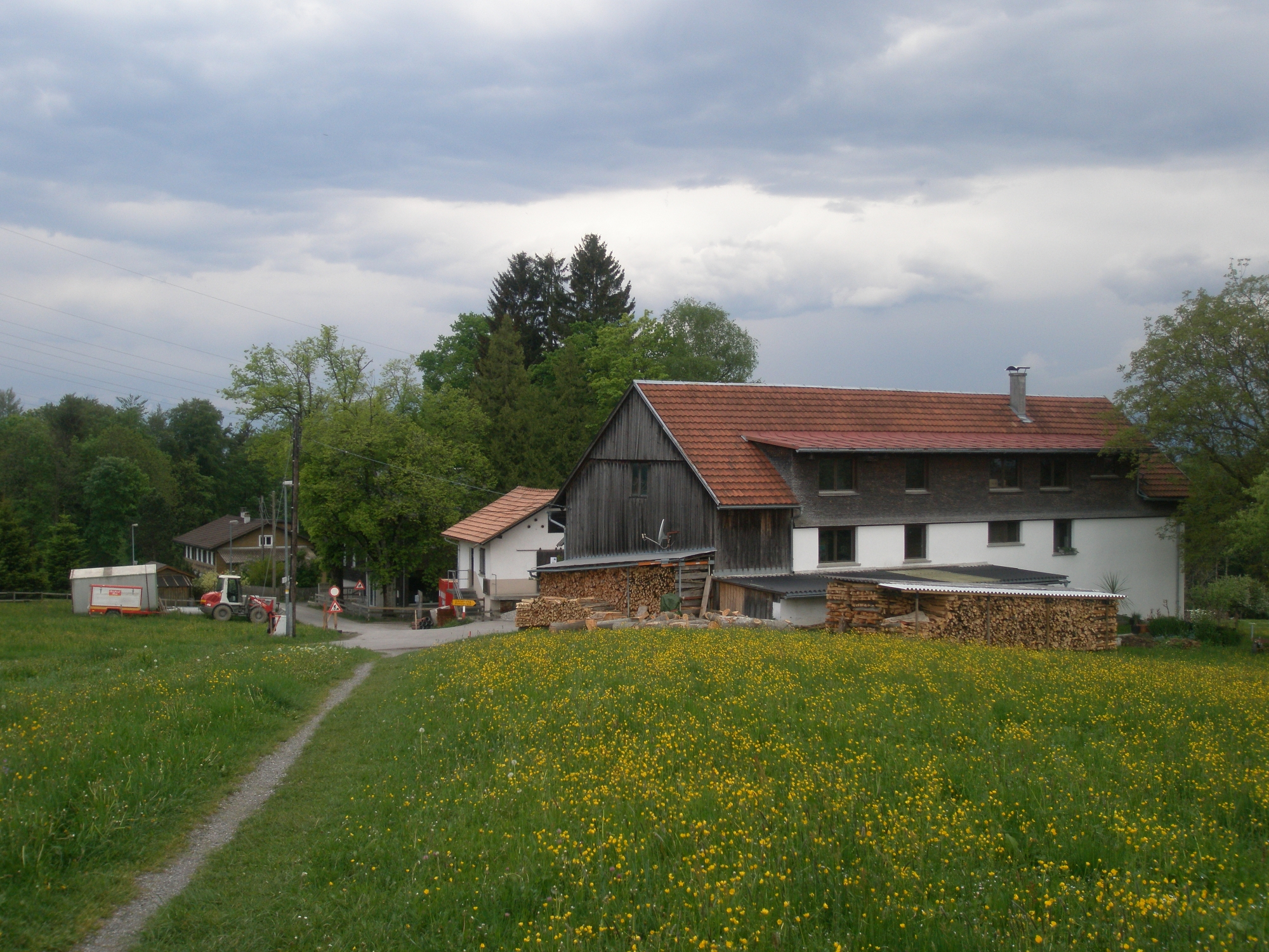 Heilgereuthe.